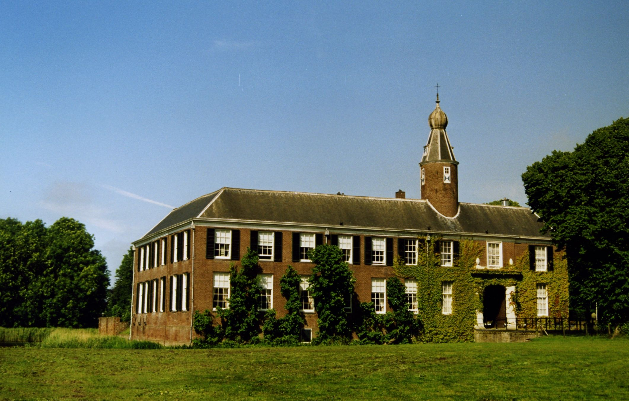 't Huis te Heemskerk of kasteel Marquette te Heemskerk.